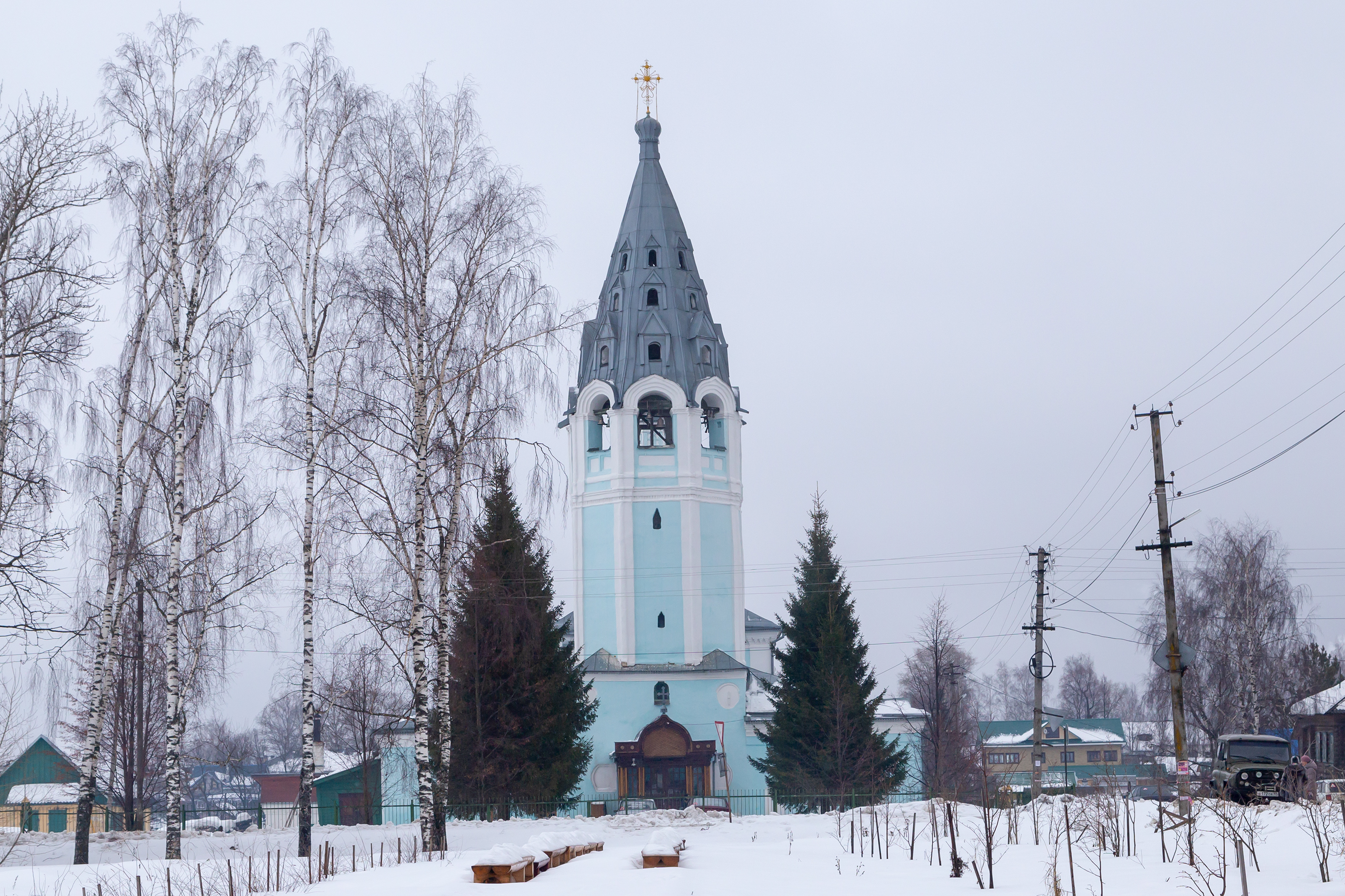 Церковь Успения Пресвятой Богородицы (Успенская): улица Свердлова, 1, Чухлома, Чухломский район, Костромская область